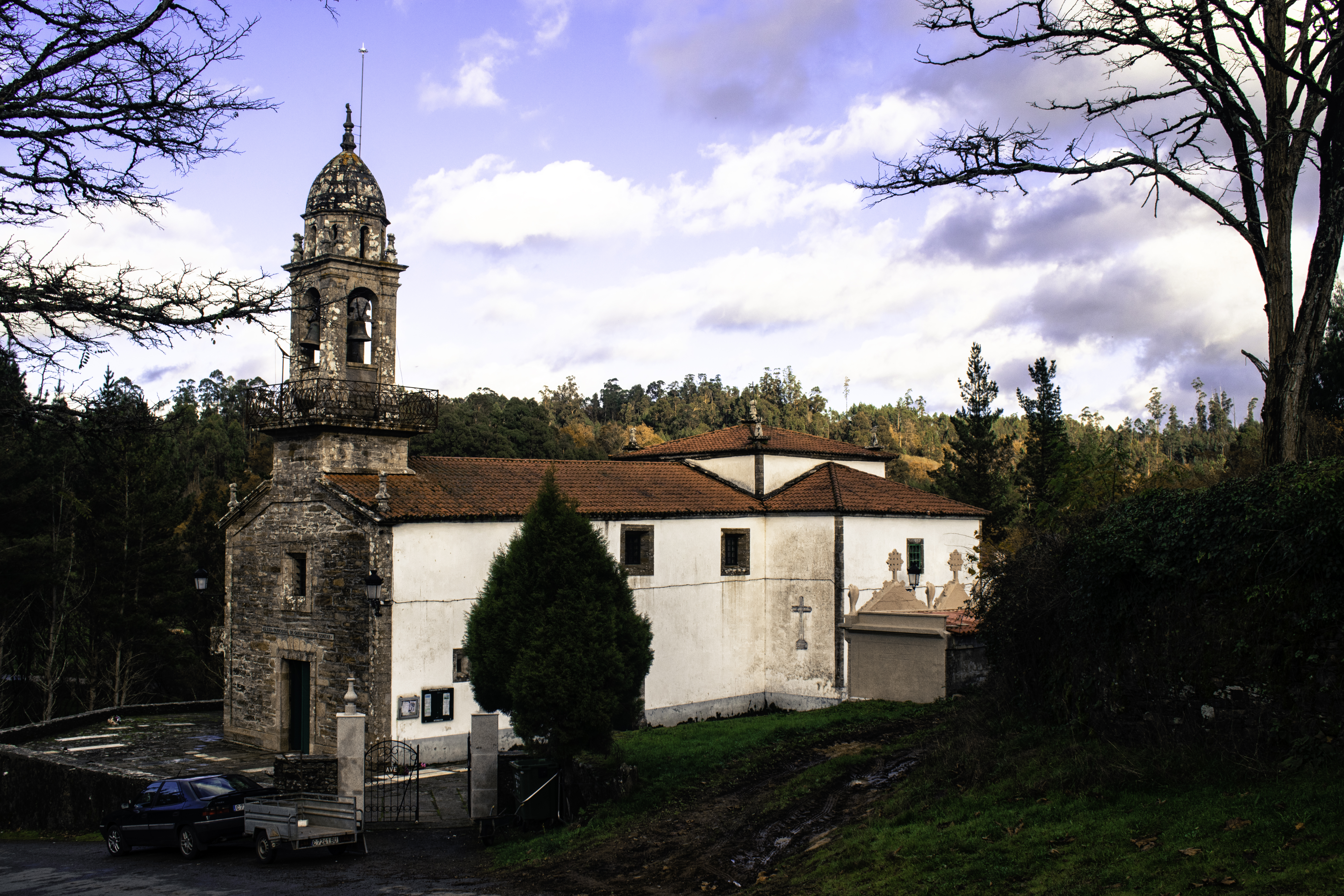 Igrexa de Santa María de Gonzar, no concello coruñés do Pino.